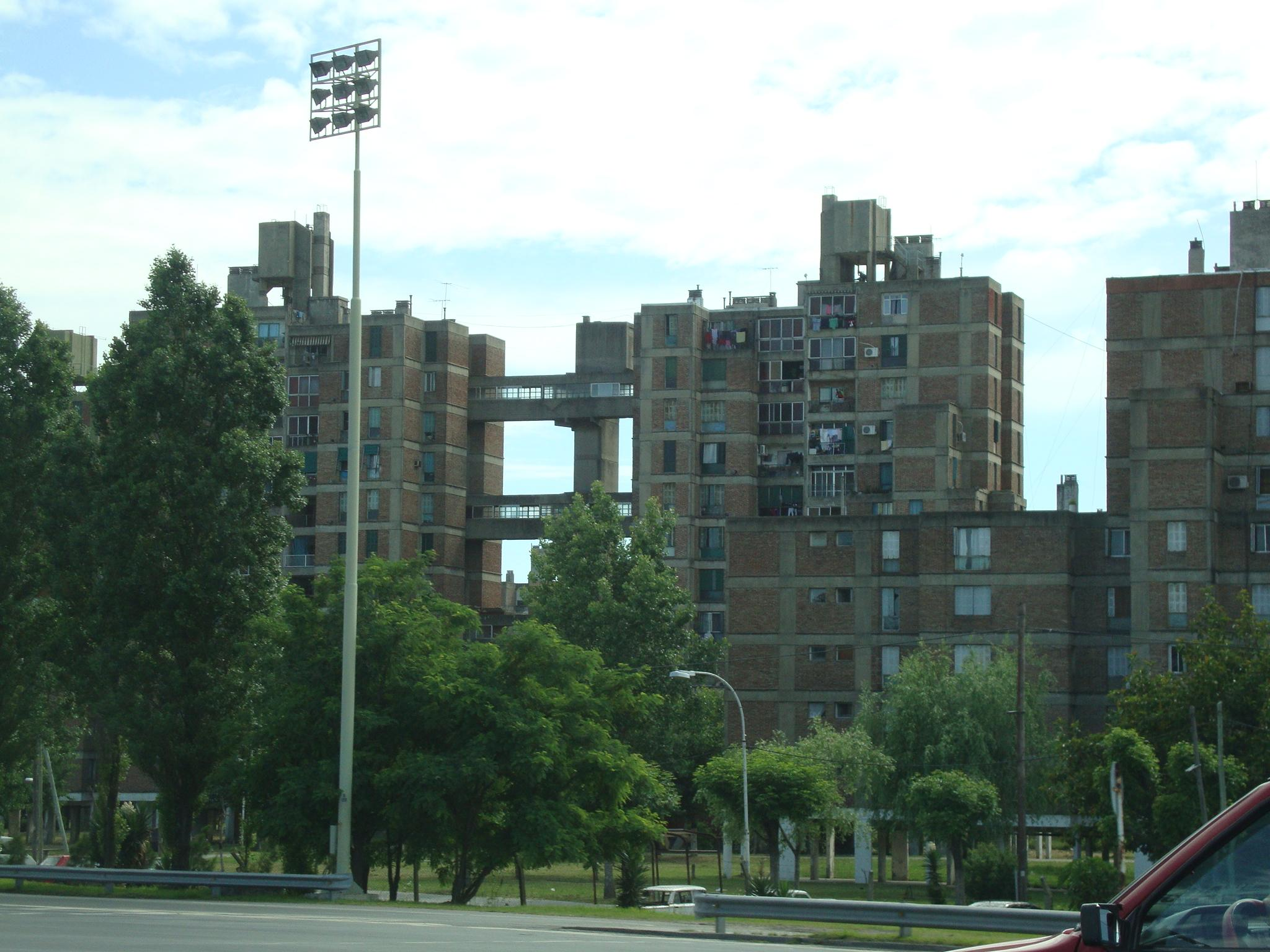 El Conjunto Habitacional Nicolás Avellaneda visto desde el Peaje Dock Sud de la AU Ricardo Balbín. También se lo conoce como Las Torres del Docke. Localidad de Dock Sud, partido de Avellaneda, provincia de Buenos Aires, Argentina.